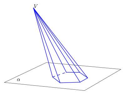 Figura ilustrativa da definição de pirâmide.